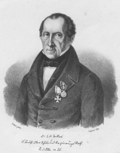 Pedagogo e discípulo de Pestalozzi